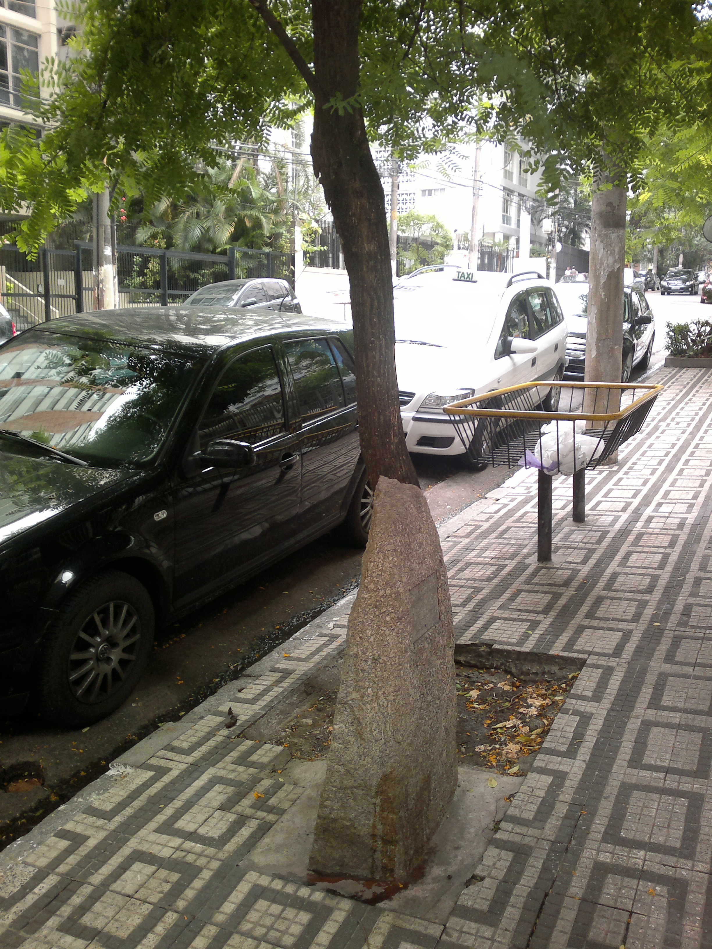 Pedra instalada na Alameda Casa Branca, em São Paulo, perto do ponto onde Carlos Marighella foi morto pela polícia paulista em 1969